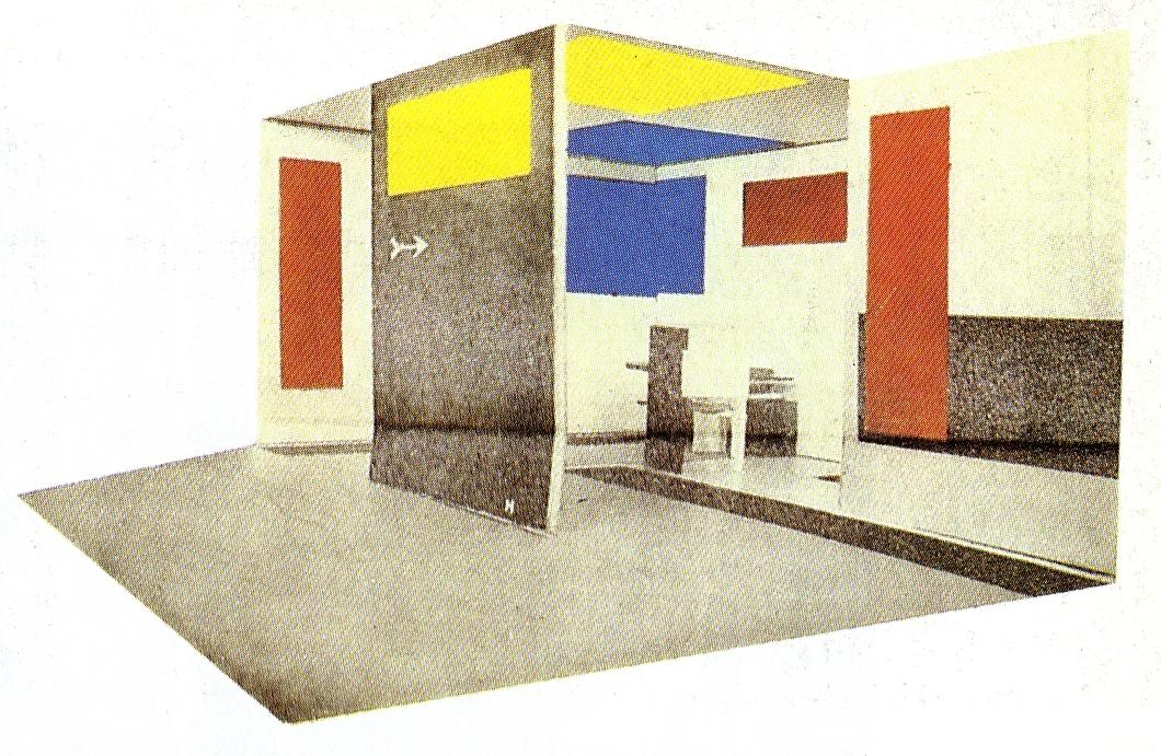 Anoniem (foto) en Theo van Doesburg (1883-1931; inkleuring). Maquette van Gerrit Rietveld en Vilmos Huszàr voor de Grote Berlijnse Kunsttentoonstelling. 1923. Ingekleurde foto. Gepubliceerd in L'Architecture Vivante in najaar 1924. Afkomstig uit Paul Overy (1997). De Stijl. London: Thames and Hudson, pp. 94-96. ISBN 0500202400